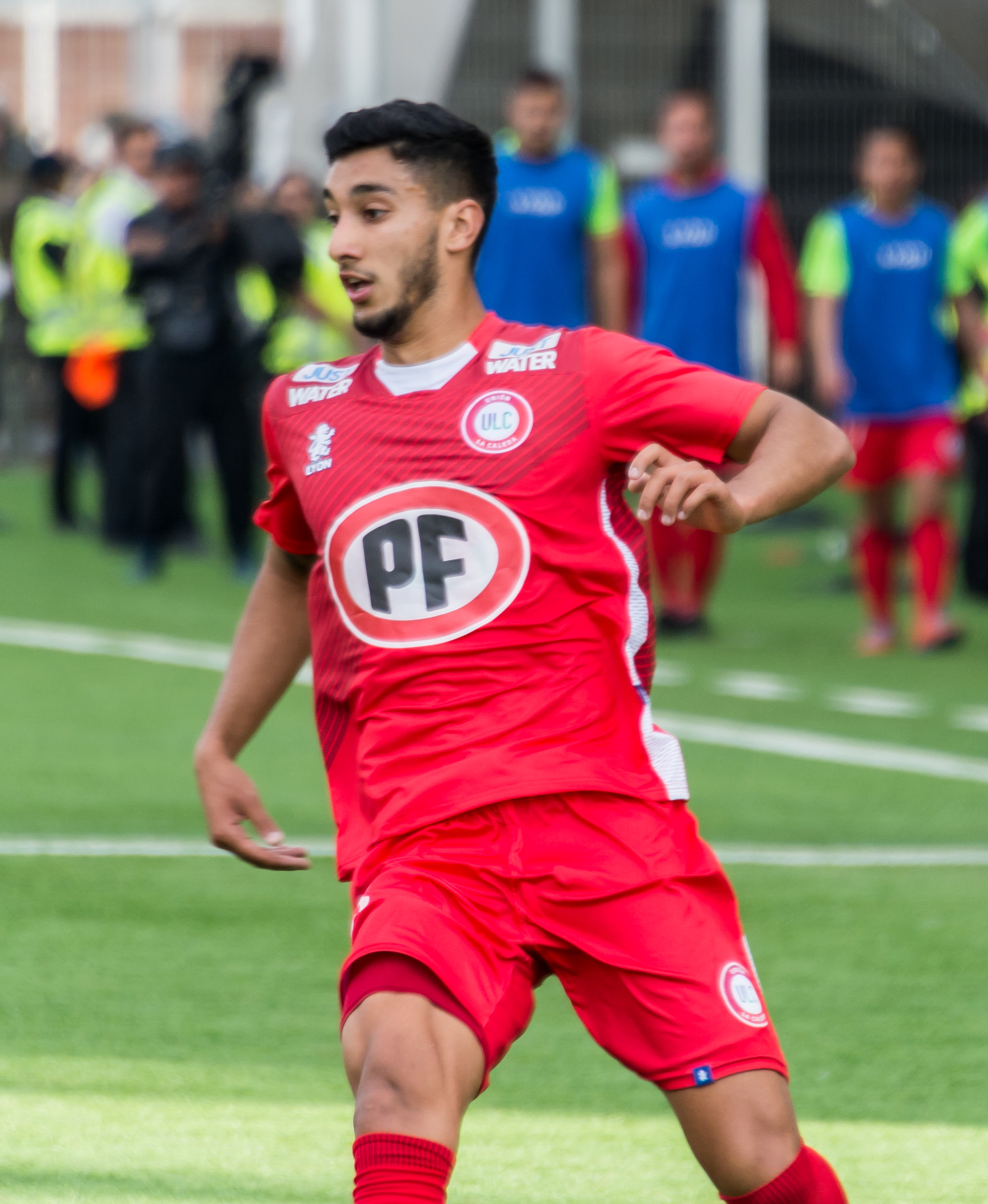 Franco Lobos, Unión La Calera v Colo-Colo, Estadio Municipal Nicolás Chahúan Nazar, La Calera, Región de Valparaíso, Chile.